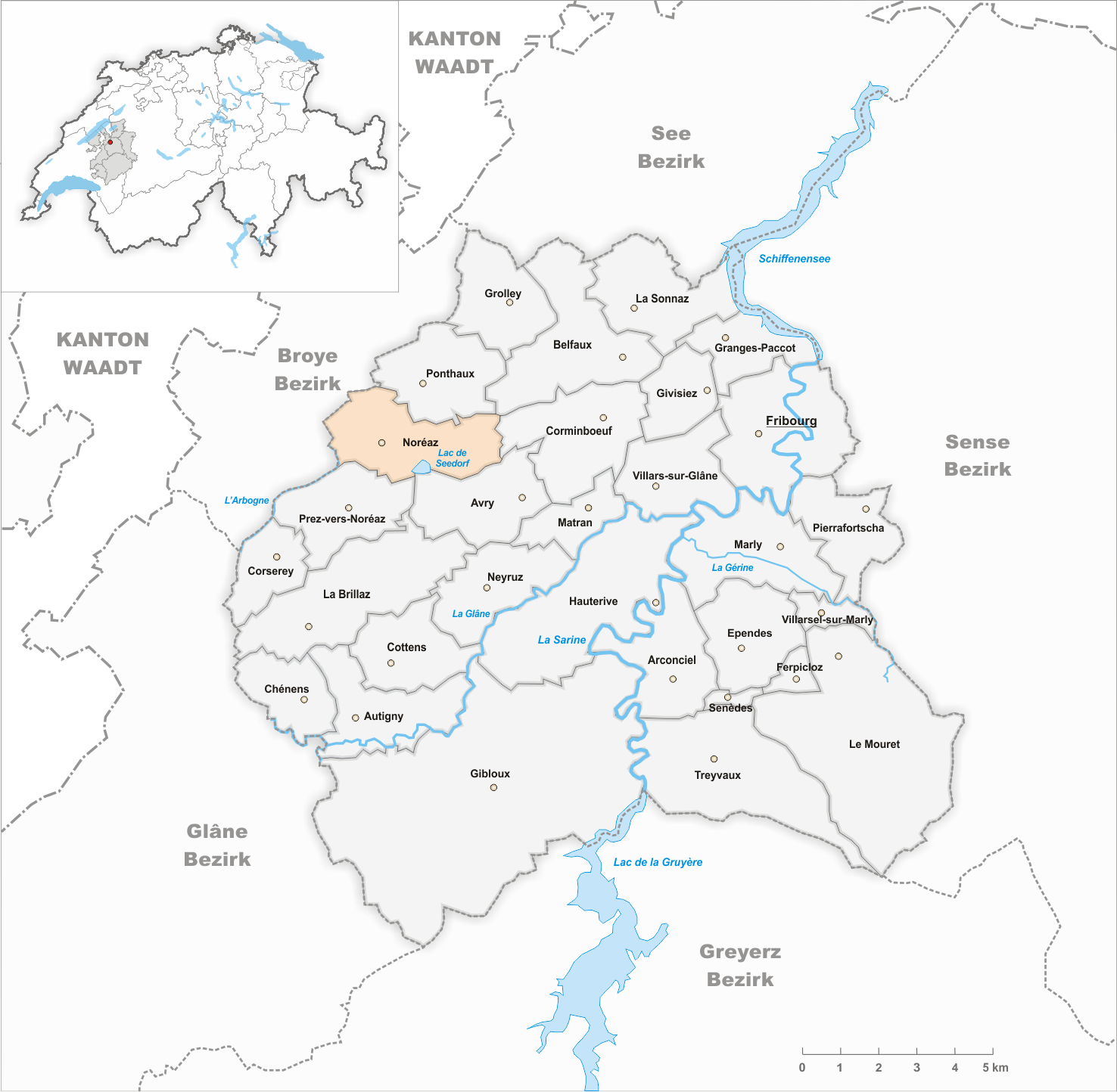 Municipality Noréaz